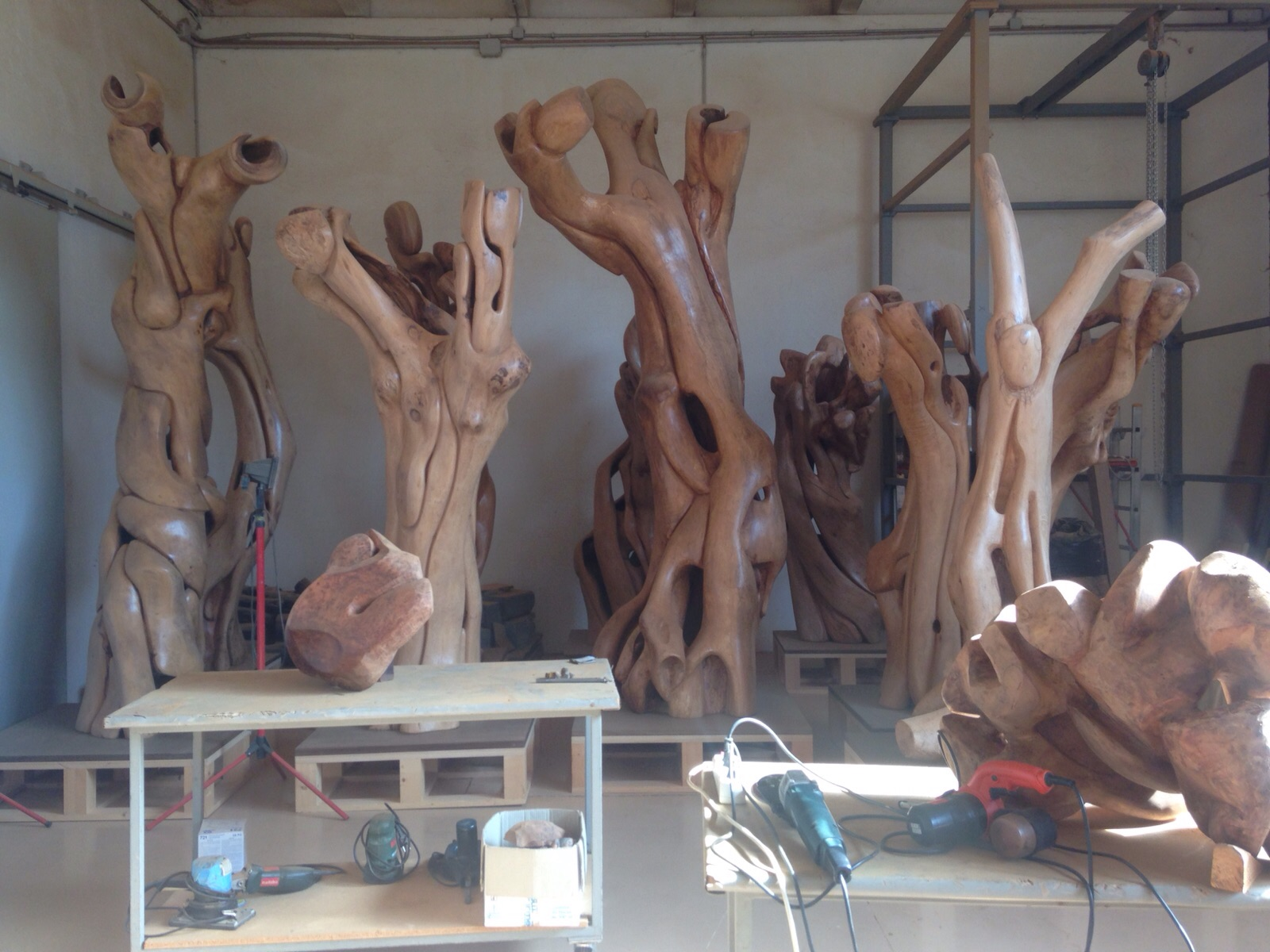 Laboratorio artistico